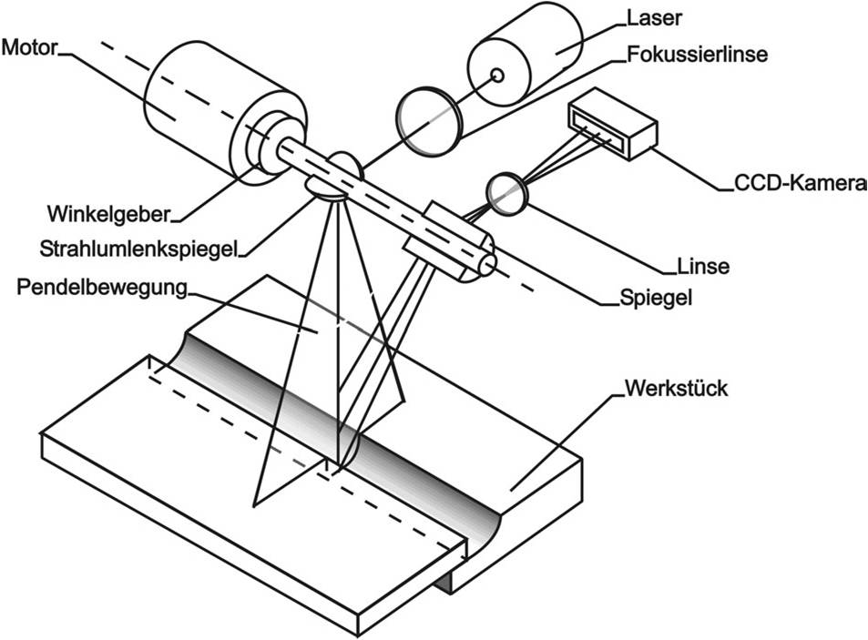 Laserscanner